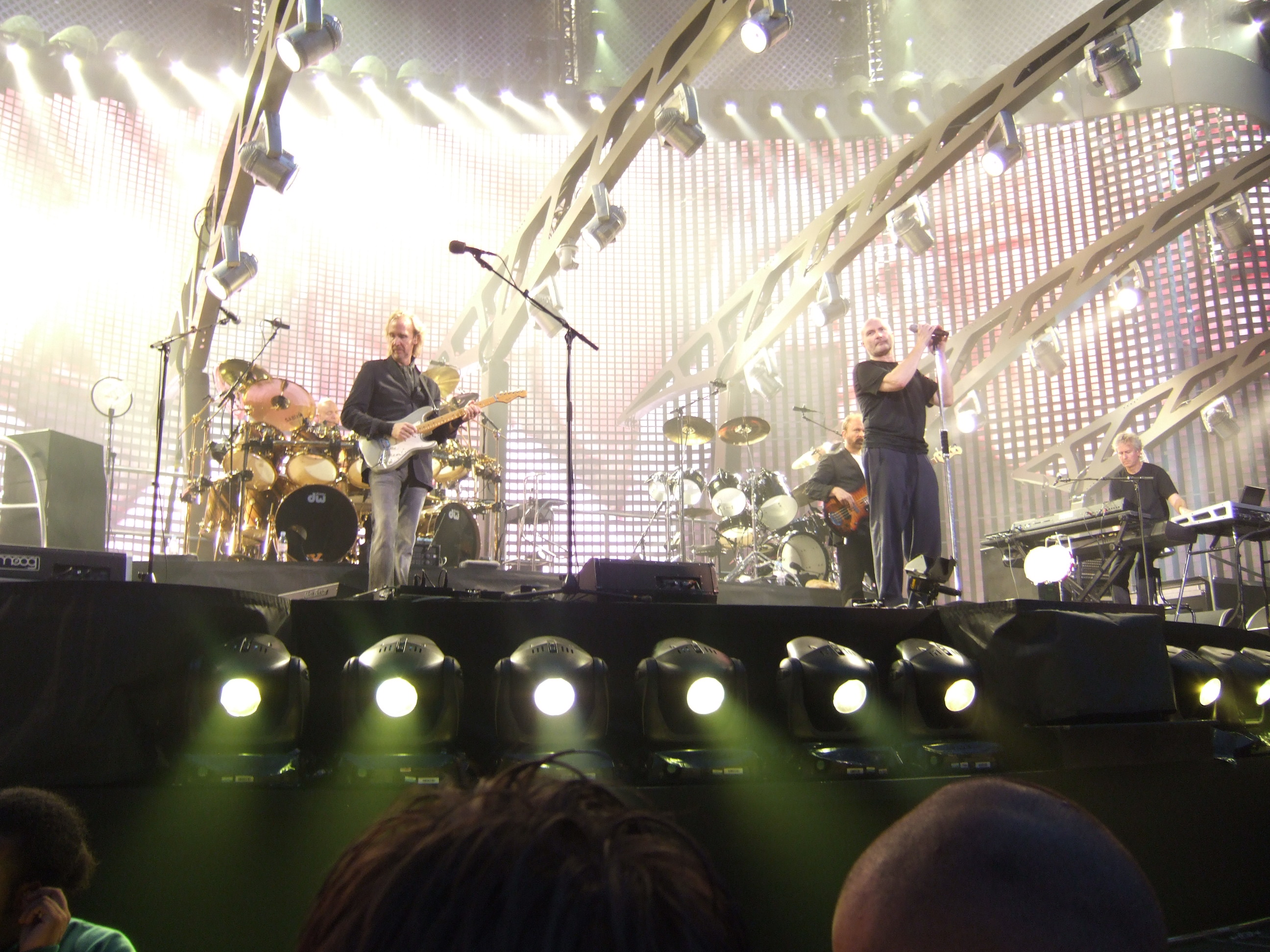 Genesis, ofwel: Phil Collins, Michael Rutherford, Tony Banks, Chester Thompson en Daryl Stuermer.